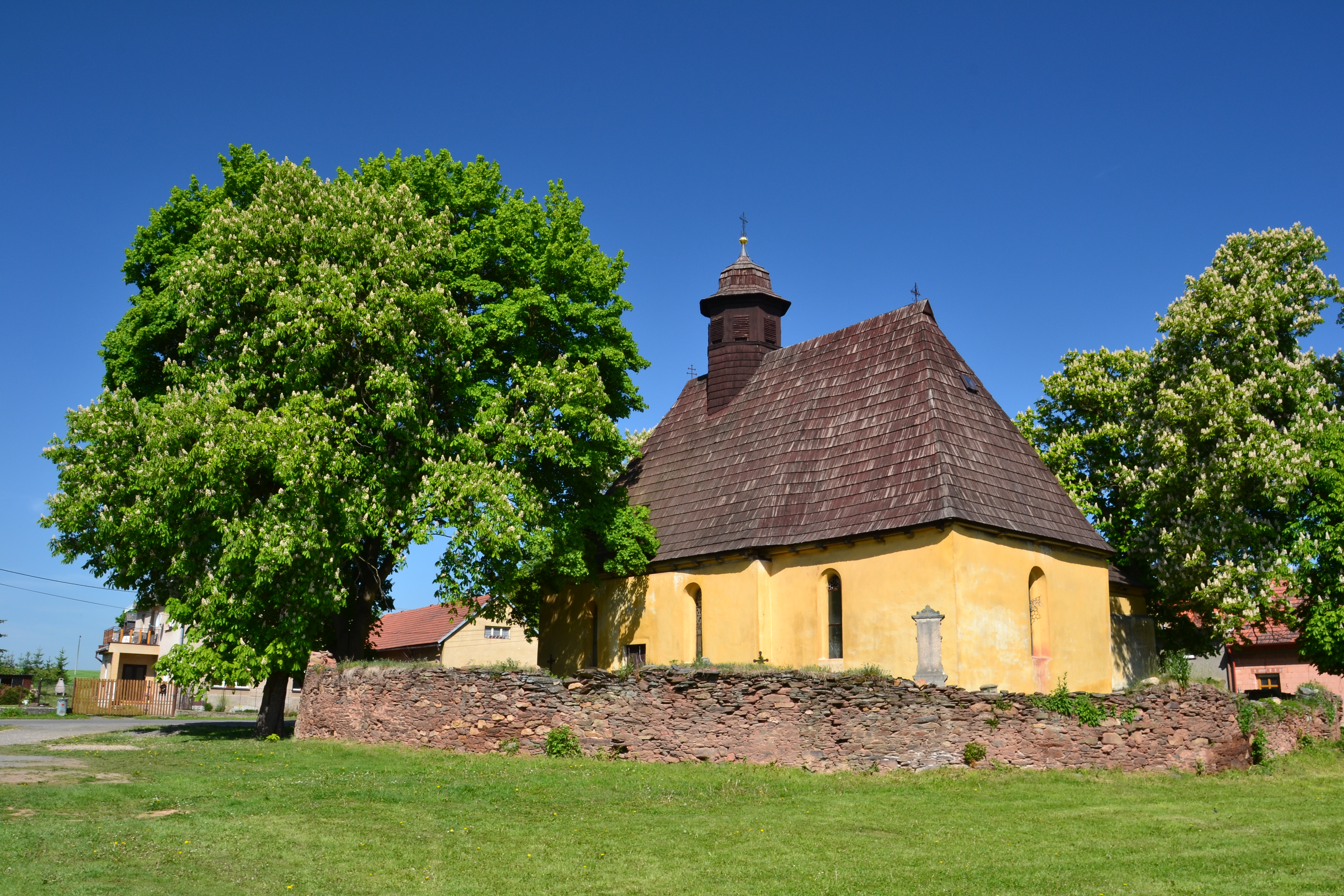 Kostel Nanebevzetí Panny Marie (Stvolny), náves, Stvolny